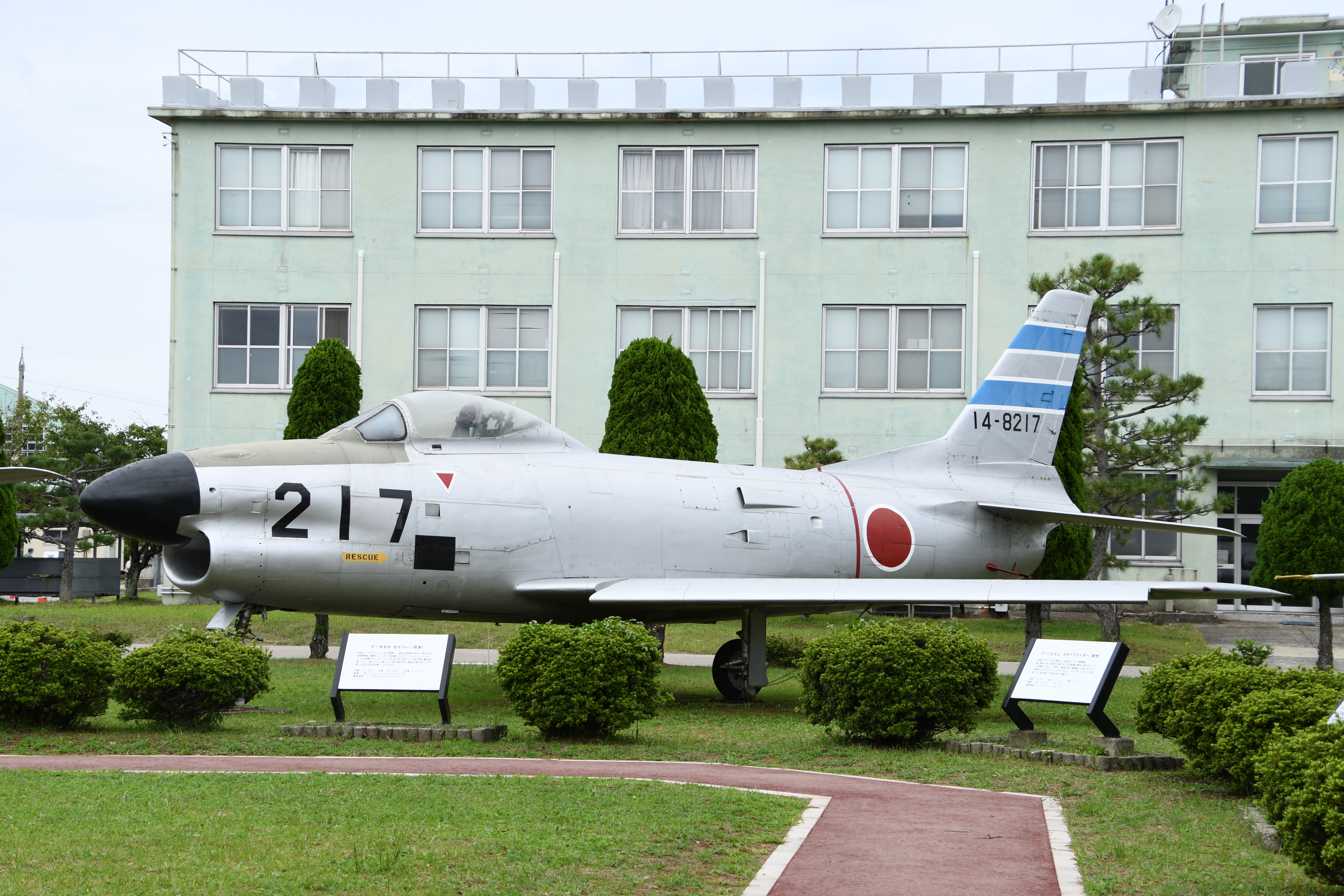 航空自衛隊 F-86D戦闘機（14-8217号機） 左前面。2018年9月17日 小松基地にて。